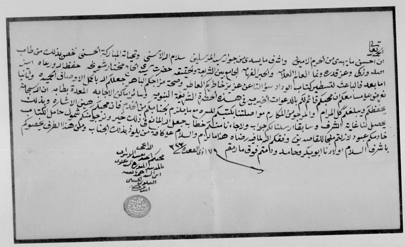 Lettre manuscrite d'Arabie saoudite remise à un émissaire venu emprunter des ouvrages au réformateur tunisien Mokhtar Chouikha